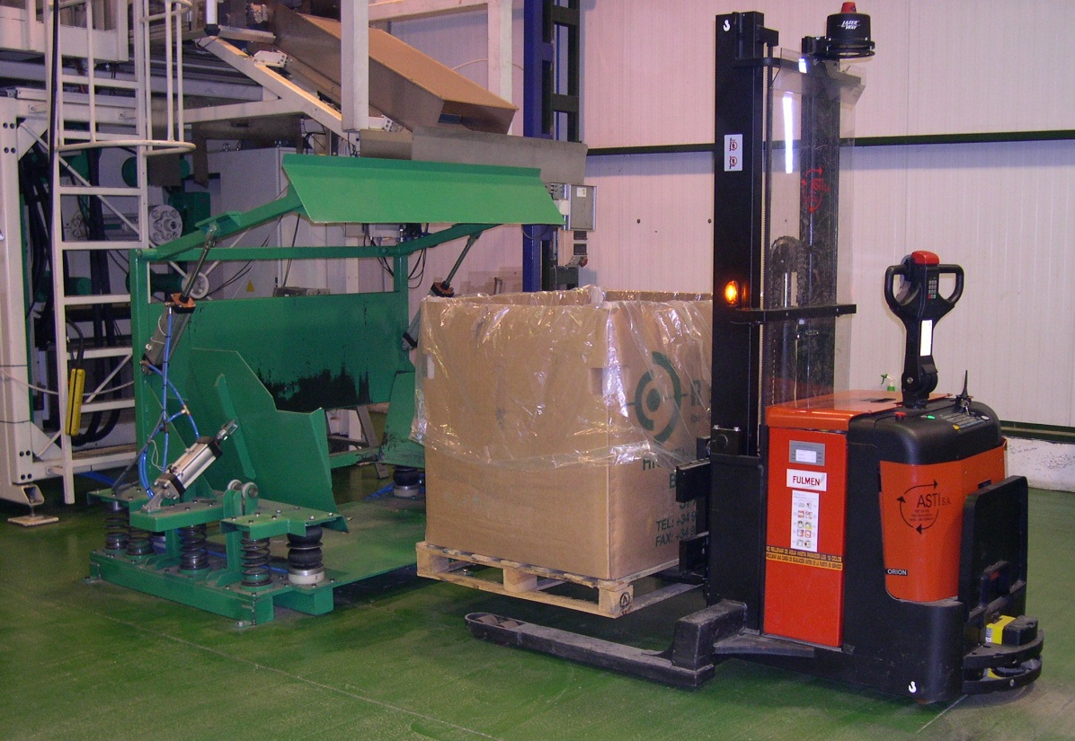 AGV apilador